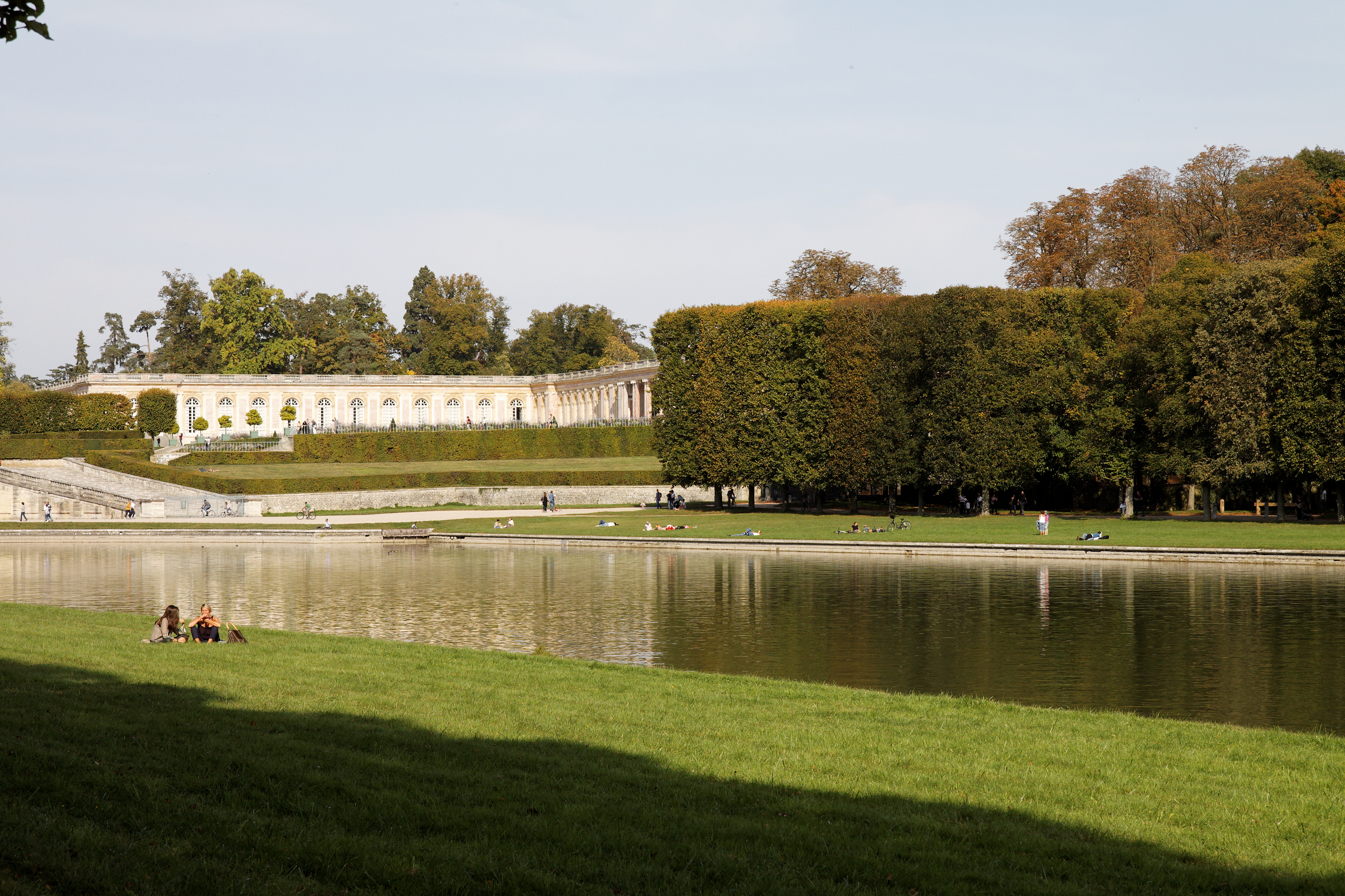 Le grand Trianon vu depuis les bords du grand canal. .